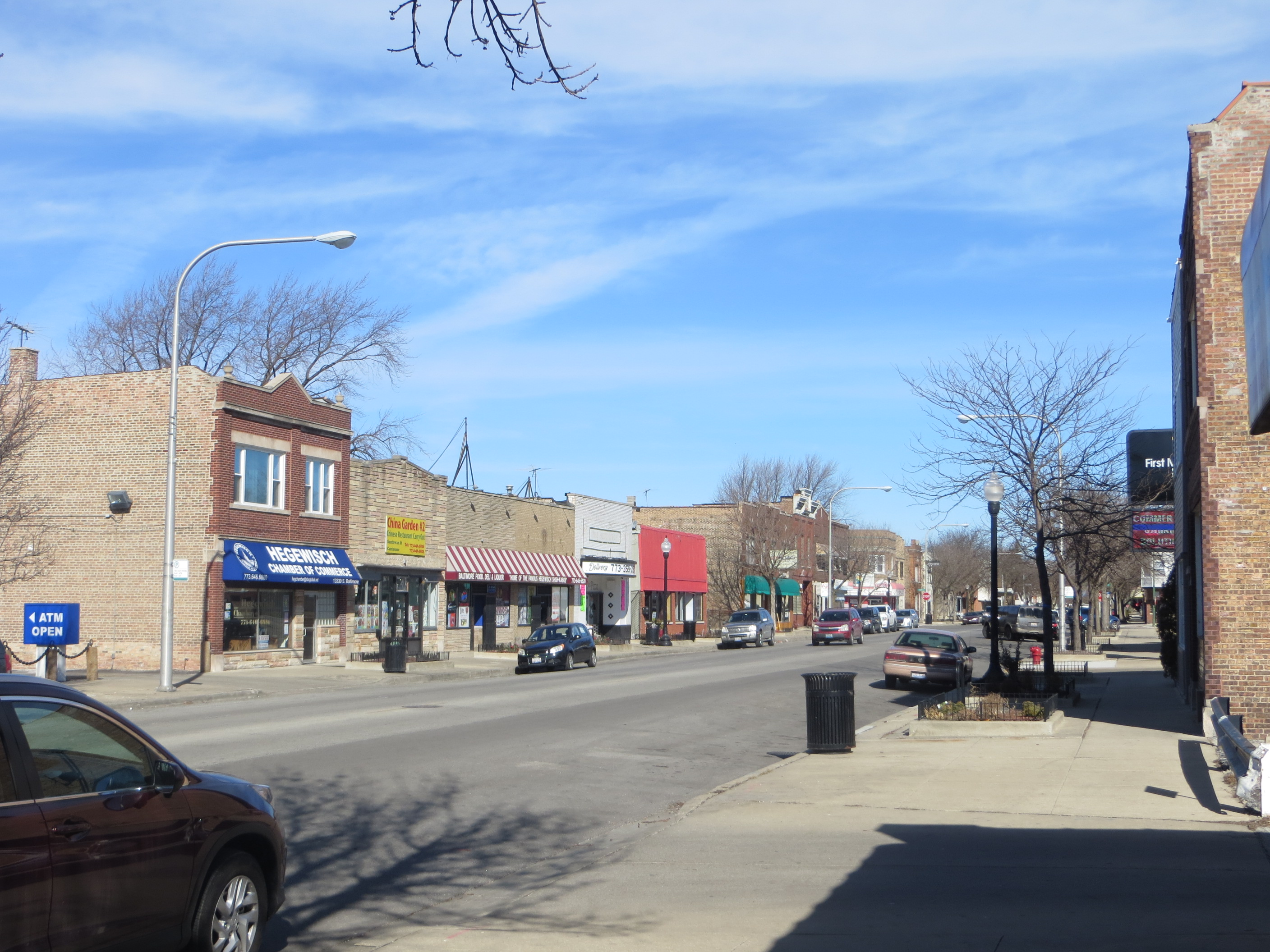 20160220 06 Baltimore Ave. near 133rd St., Hegewisch